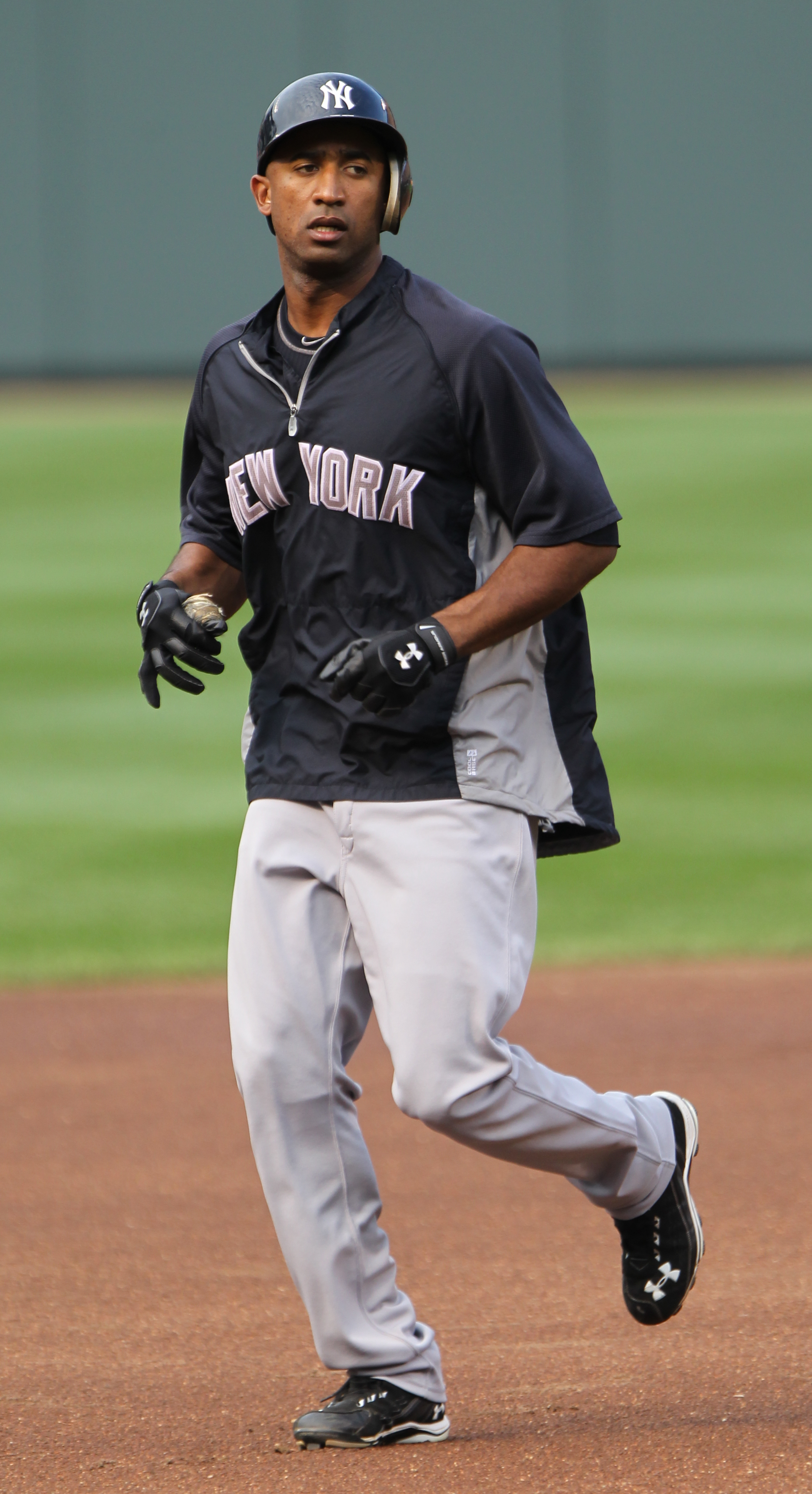 Yankees at Orioles August 29, 2011